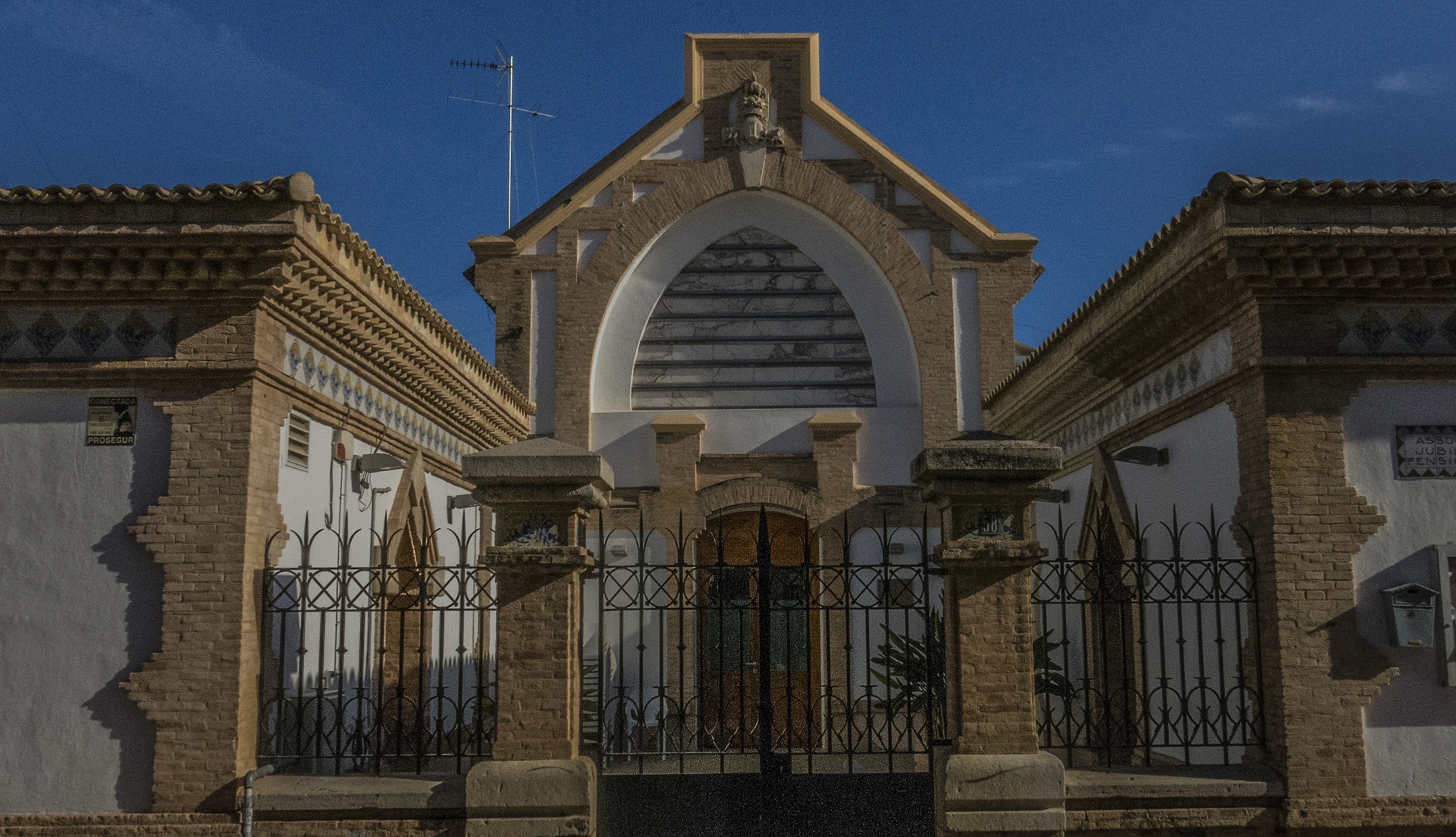 Actualment casa dels jubilats d'Alginet.